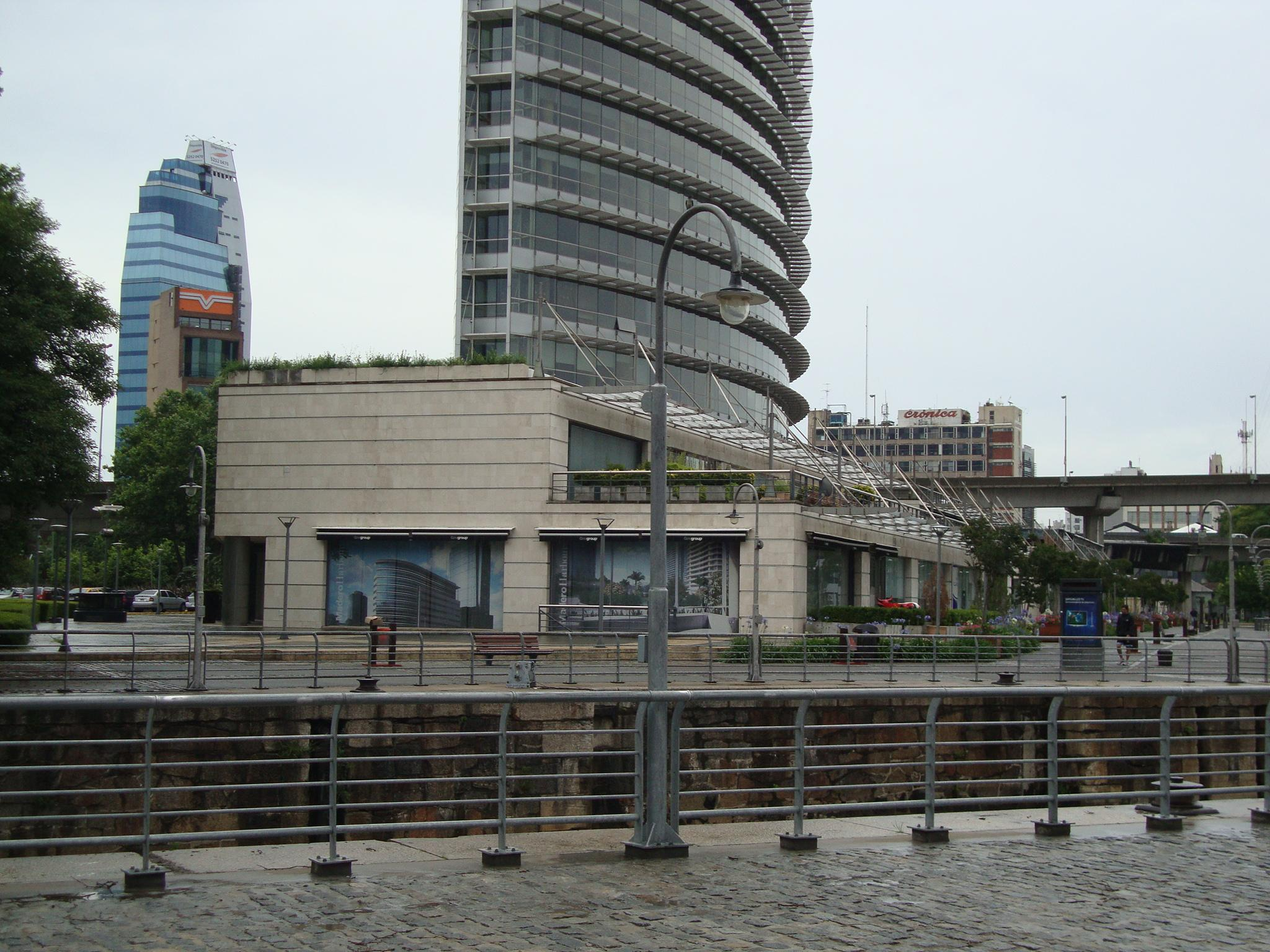 Vista del basamento del Edificio Malecón (1999), ocupado por locales comerciales. A la izquierda sobresale en segundo plano el edificio de la Agencia Nacional de Seguridad Vial (Av. Ingeniero Huergo 1481) y la Torre Sur (Av. Brasil 55). A la derecha, la azotea del edificio de la Editorial Sarmiento, con el logo del Diario Crónica (Av. Juan de Garay 140).